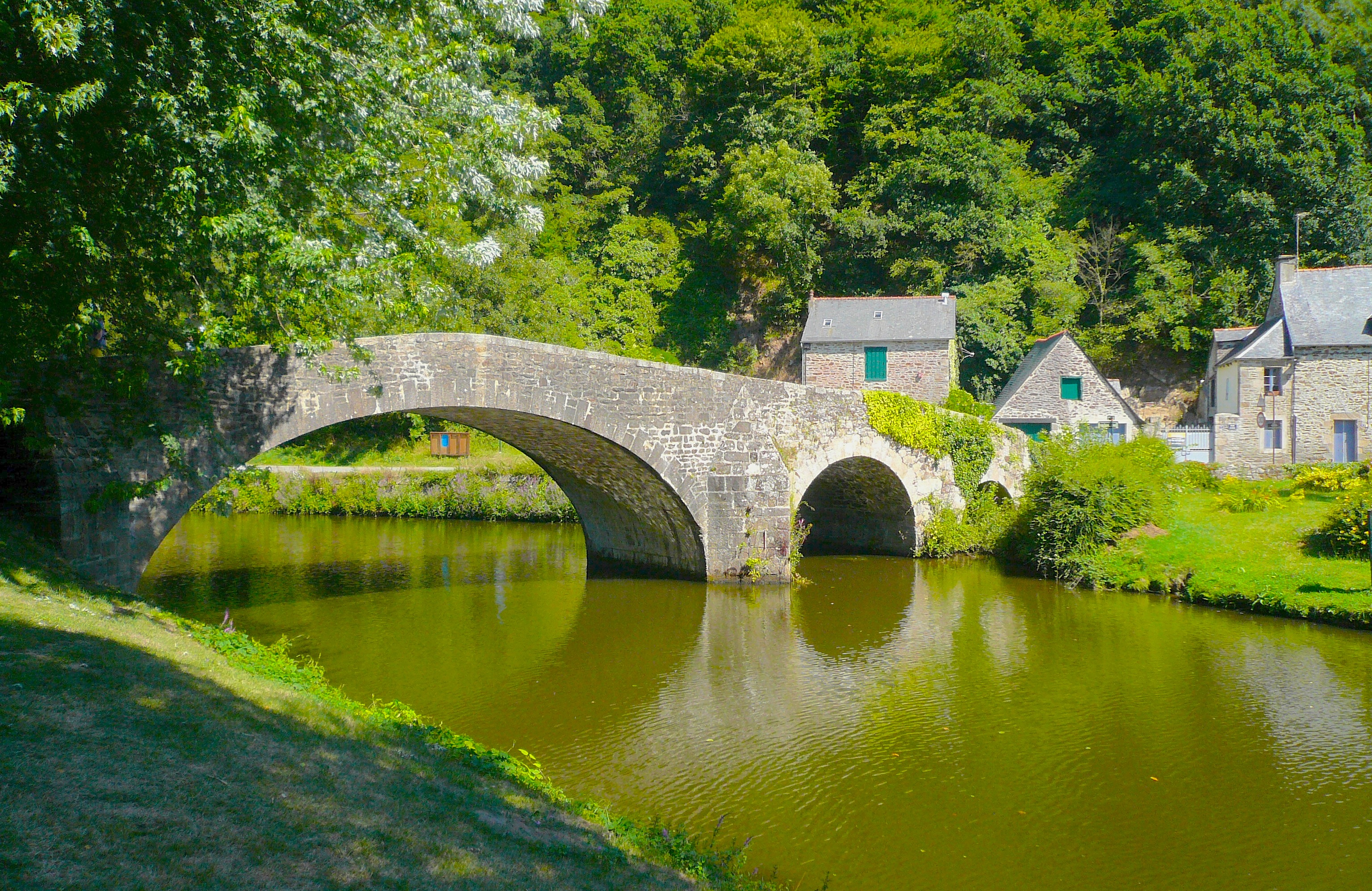 Le petit pont sur la Rance à Léhon, près de Dinan, dans les Côtes d'Armor.